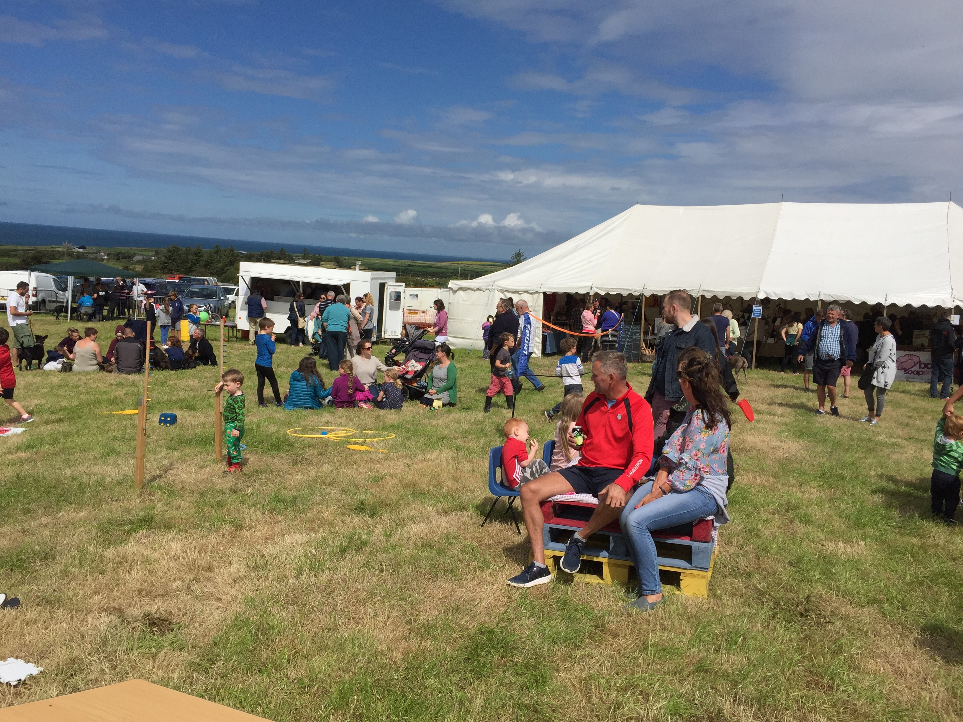 Sioe Tudweiliog 2018